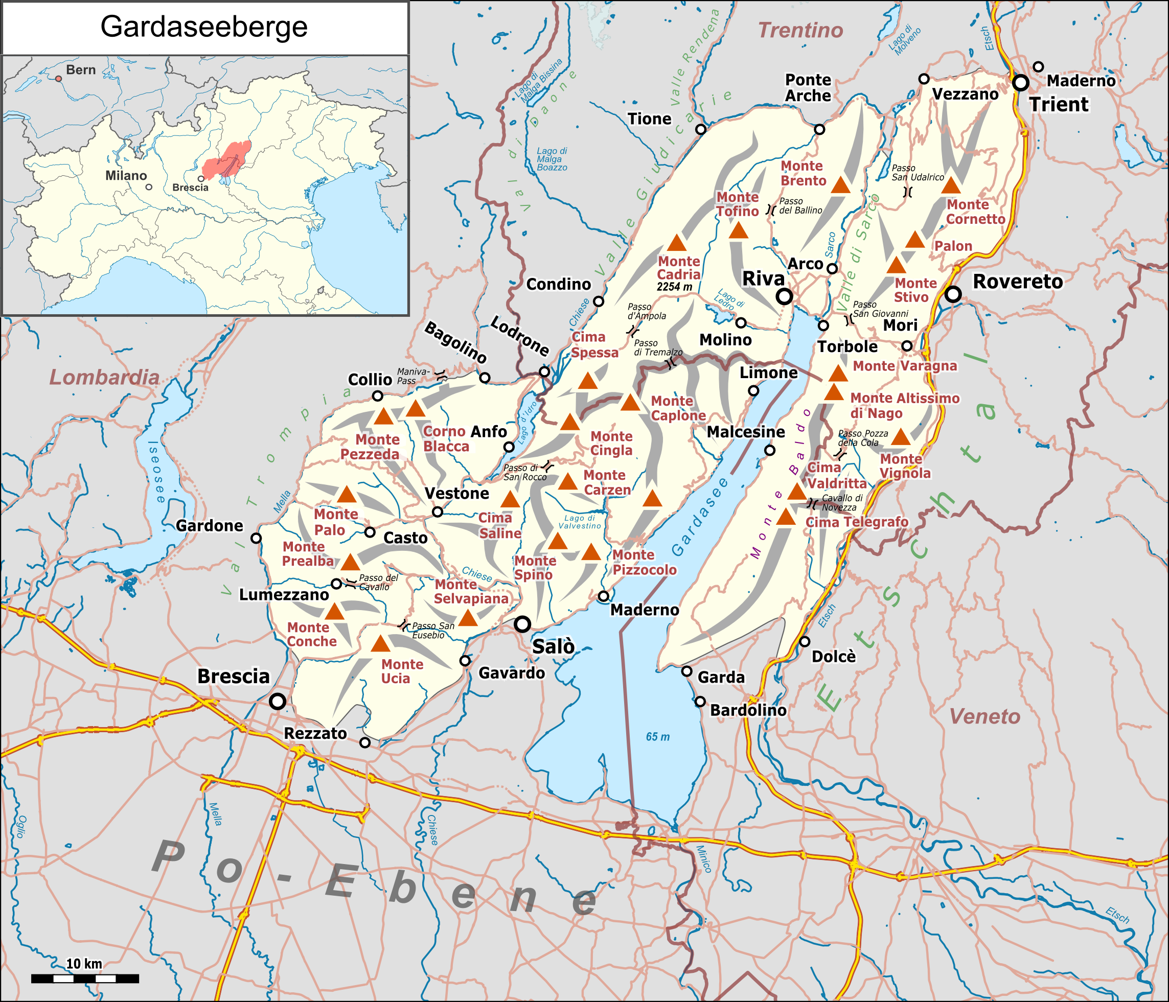 Übersichtskarte der Gardaseeberge